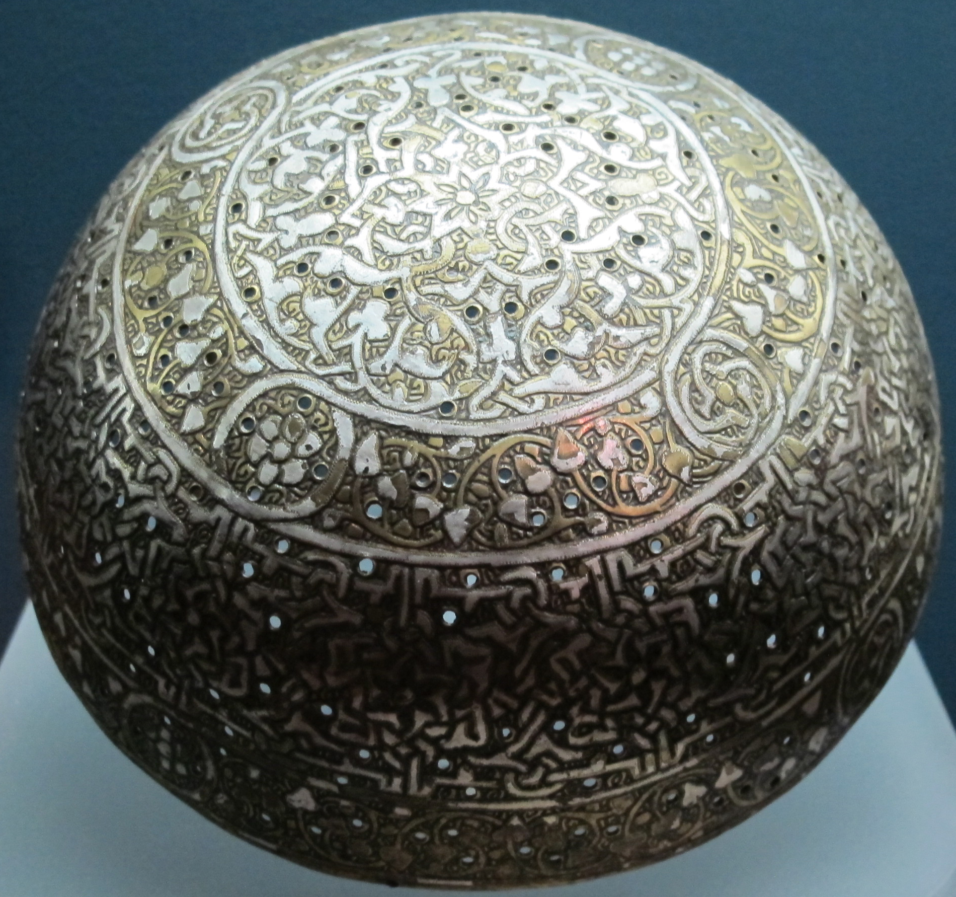 Arte mamalucca, mezzo incensiere, fine XV-inizio XVI sec